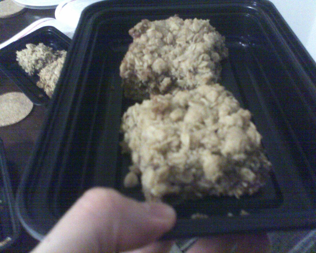 Date squares - a dessert cake